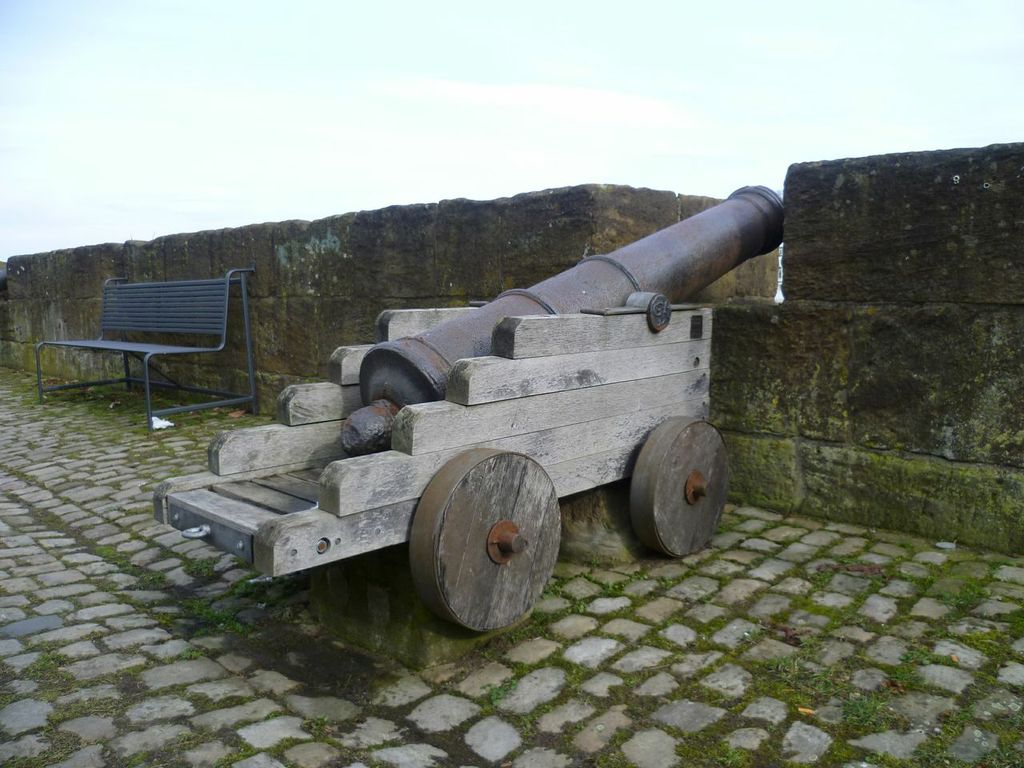 Die ehemalige Festungsmauer in der Fischerstadt in Minden, mit Kanone